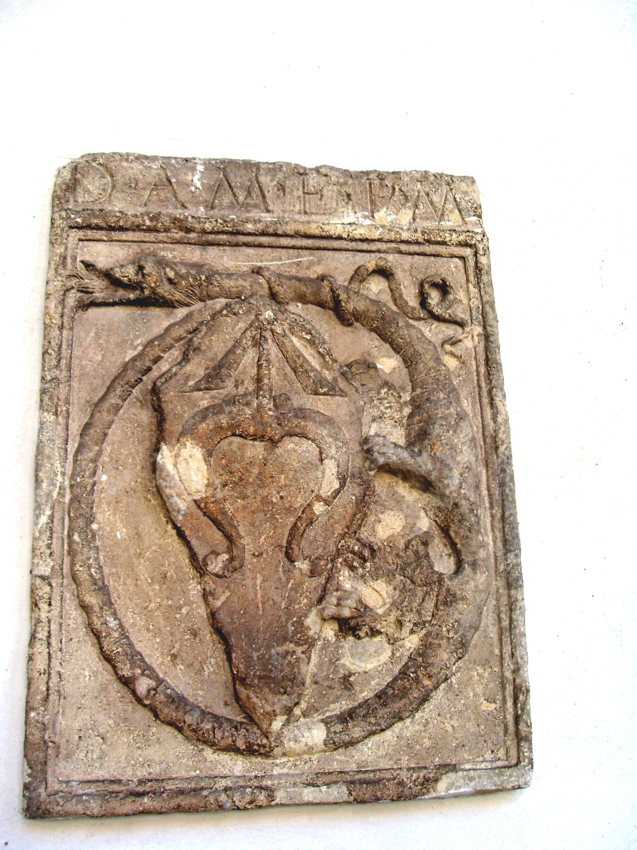 Tarcza herbowa z dziedzińca zamku na Wawelu z herbem kanclerza szydłowieckiego. Wokół tarczy smok trzymający się za ogon- symbol przynależności kanclerza do Zakonu Smoka.